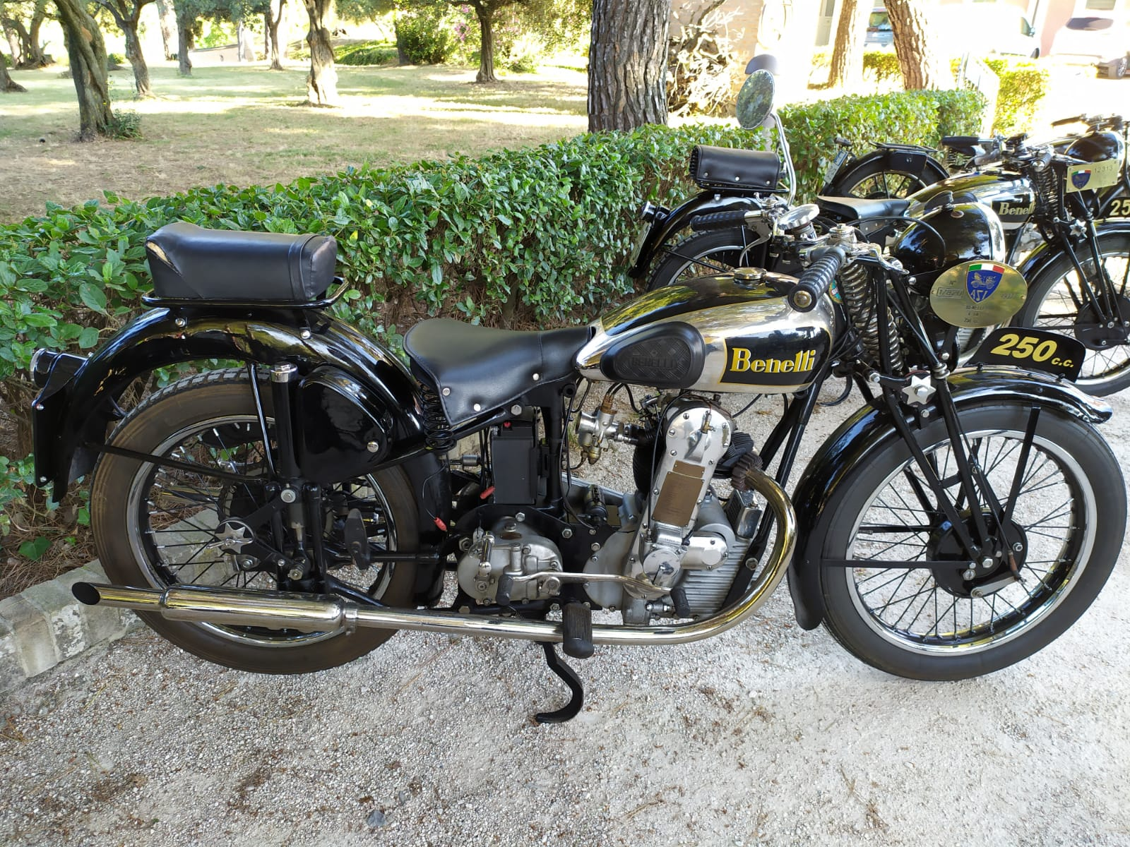 Benelli 250 del 1937 con sospensione elastica posteriore